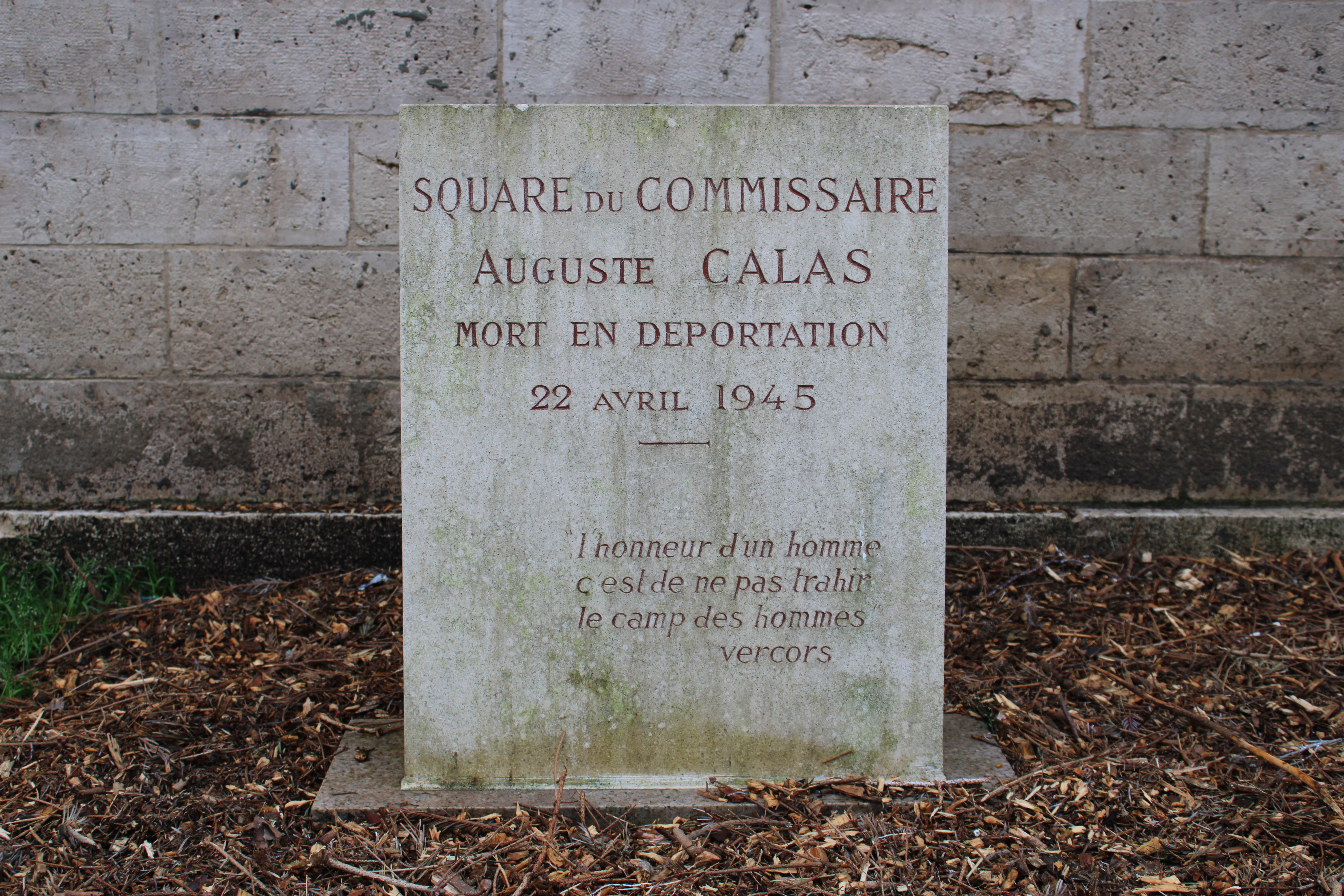 Plaque figurant dans le square en l'honneur au commissaire Auguste Calas, mort en déportation le 22 avril 1945. Suivi de la citation "l'honneur d'un homme c'est de na pas trahir le camp des hommes" vercors